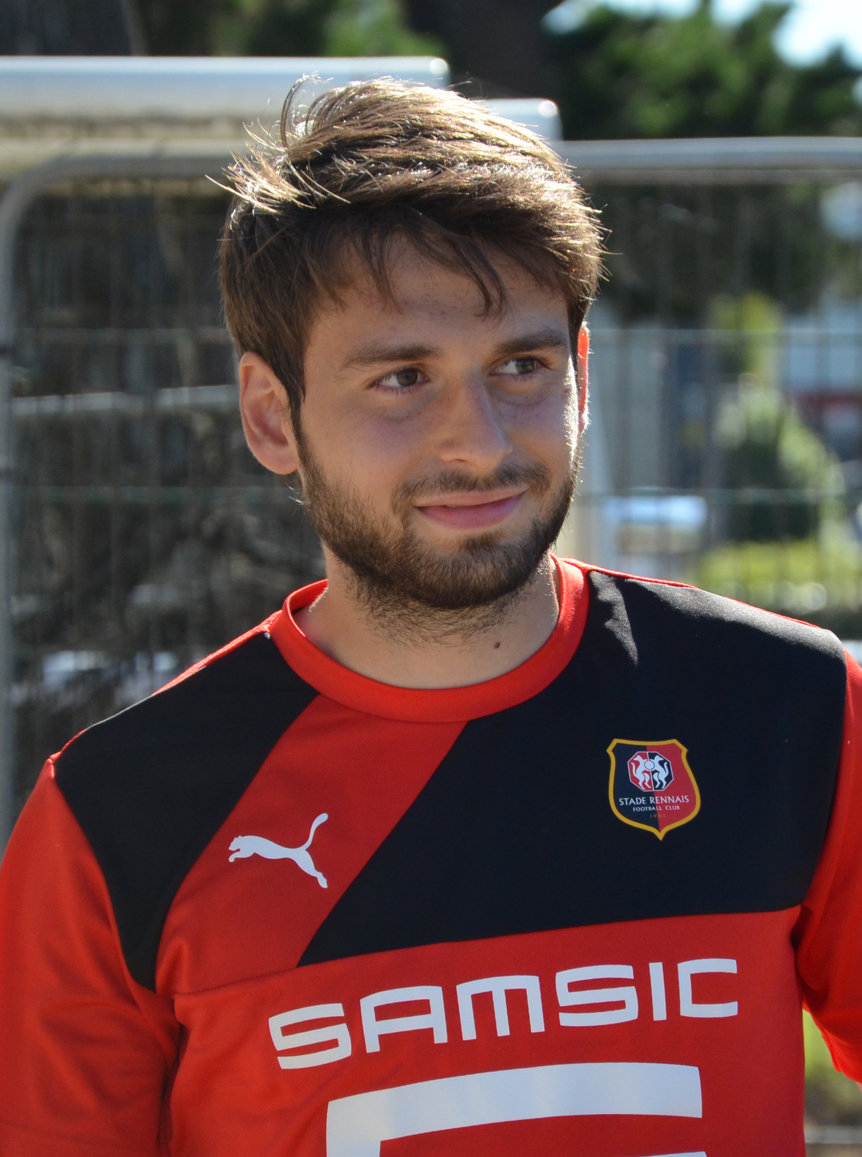 Photographie prise lors du match opposant le Stade rennais à l'USM Alger en match amical au stade Paul-Audrin de Dinard le 16 juillet 2016. Ici, Sanjin Prcic.